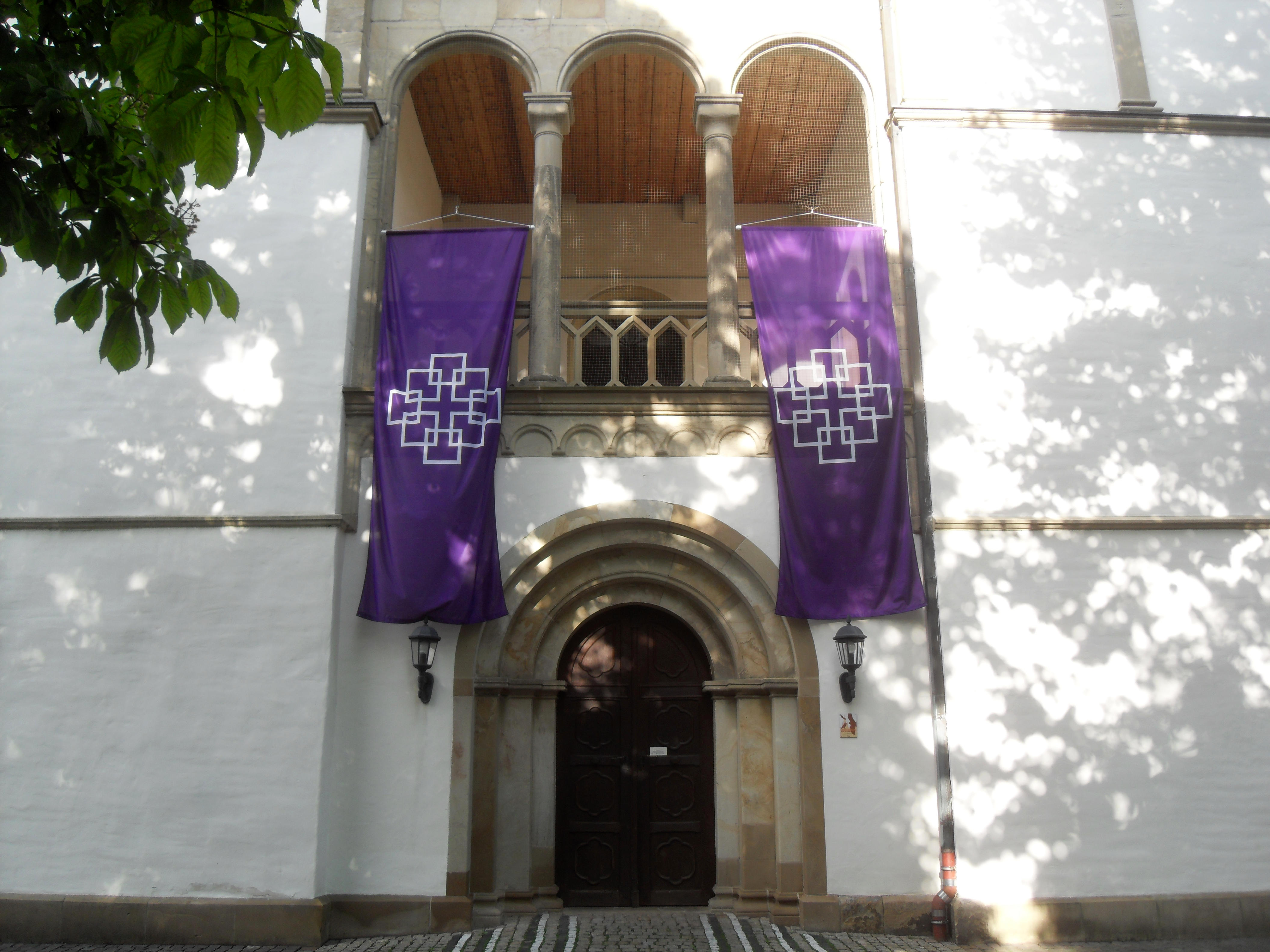 Der Haupteingang der Guntersblumer evangelischen Kirche in Rheinhessen in Rheinland-Pfalz (Deutschland)